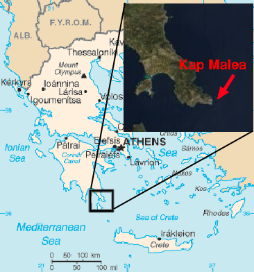 Karte von Kap Malea